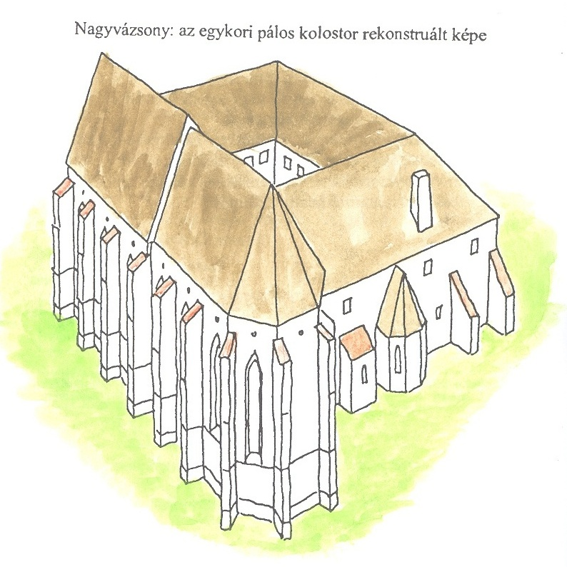 A pálosok nagyvázsonyi kolostora